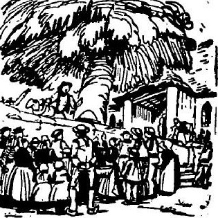 Dessin représentant des bonimenteurs lors d'un pardon en Bretagne [Ouest-Eclair n°14057 du 3-05-1935]